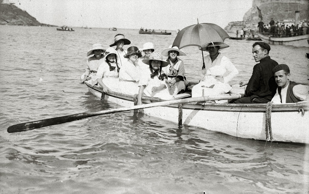 Título original: Regatas de traineras. Bandera de la Concha (3/18) Localización: San Sebastián (Guipúzcoa)